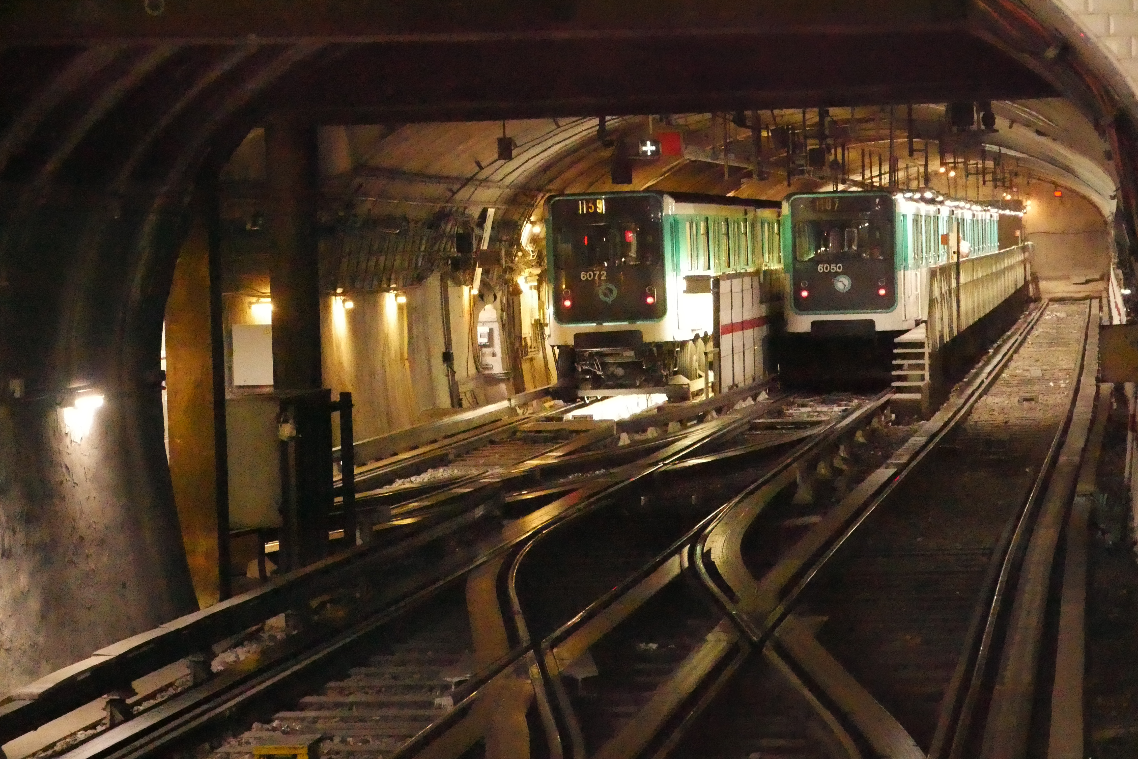 Arrière-station de Châtelet (ligne 11) après allongement du tunnel afin de permettre le retournement des futures rames de 7 voitures lors du prolongement de la ligne.